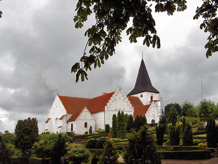 fra nordøst